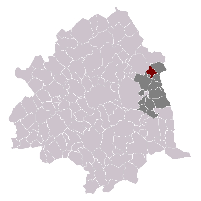 Lyz-les-Lannoy